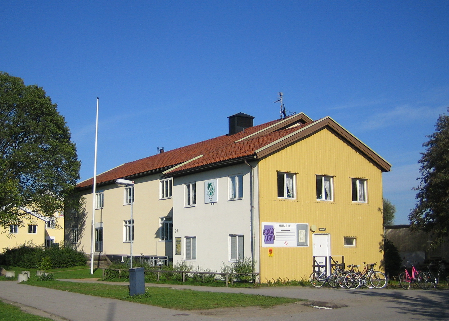 Husie IF quarters in Kvarnby, Malmö, Sweden